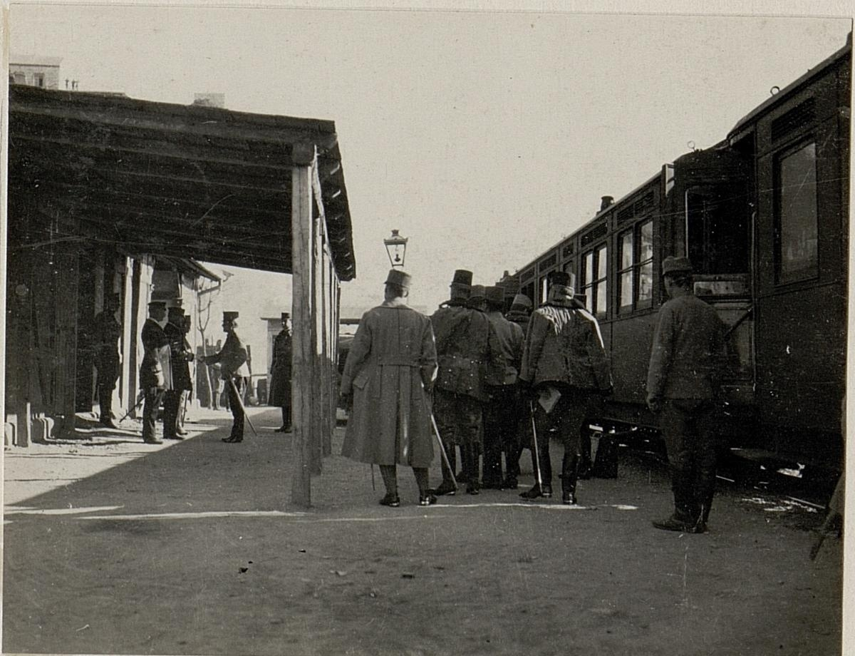 Ankunft in Castelnuovo und Bergrüssung durch das Kriegshafenkommando. Aufgenommen in Castelnuovo am 12. Februar 1916.